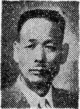 이정희 (1903 - 1981), 한국의 정치인, 교육자, 제3,4대 국회의원